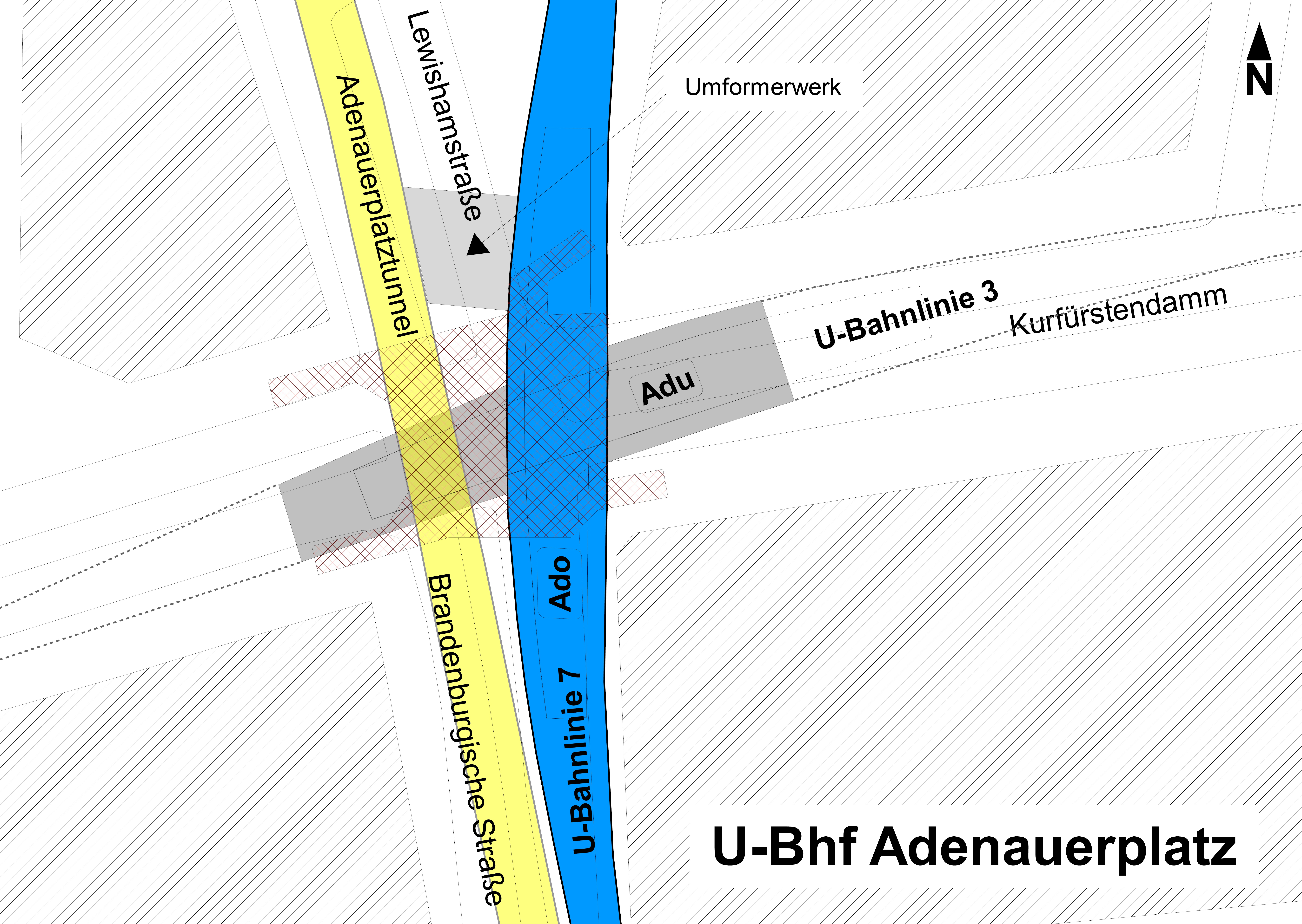 Der U-Bahnhof Adenauerplatz mit Bauvorleistung für eine zukünftige U-Bahnlinie 3, Lageplan